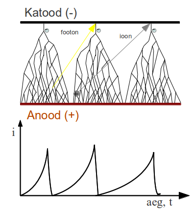 Joonisel on kujutatud kolme elektronlaviini ja nendega kaasneva elektrivoolu (i) ajalist käiku. Katoodist väljunud elektron tekitab sekundaarelektrone, mis põhjustavad omakorda vabade elektronide tekkimise. Juhul kui laviinis tekkinud valguskiirguse footon põhjustab katoodist elektroodi väljalöögi võib ka see tekitada uue laviini ja omakorda footoni või näiteks positiivse iooni tekkimisega põhjustada katoodi materjalist elektroni väljatõmbamise ja laviini tekkimise. Elektrivoolu impulsi suurus sõltub gaasi läbinud laengukandjate arvust. Suurim osa laengukandjaid tekib anoodilähedases ruumis. Footonid liiguvad väga palju kiiremini kui positiivsed ioonid ja põhjustavad esimesed sekundaarlaviinid.